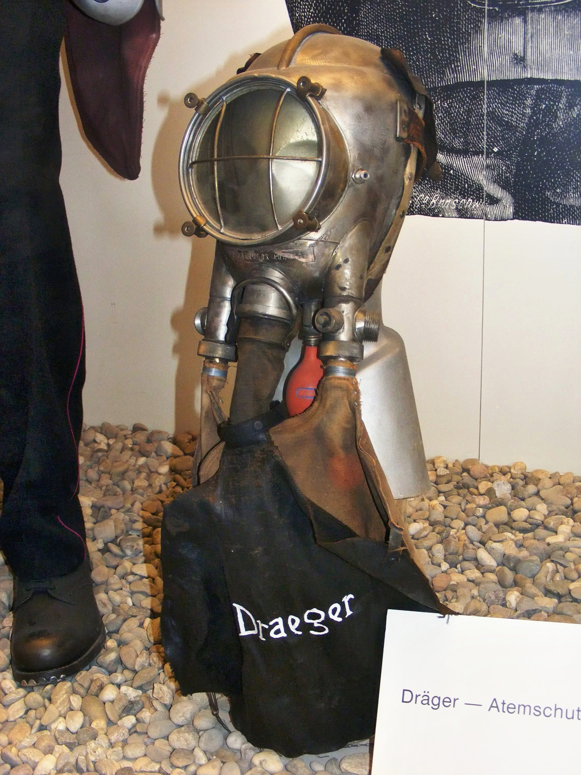 Historische Dräger-Atemschutzmaske (Deutsches Feuerwehrmuseum Fulda).